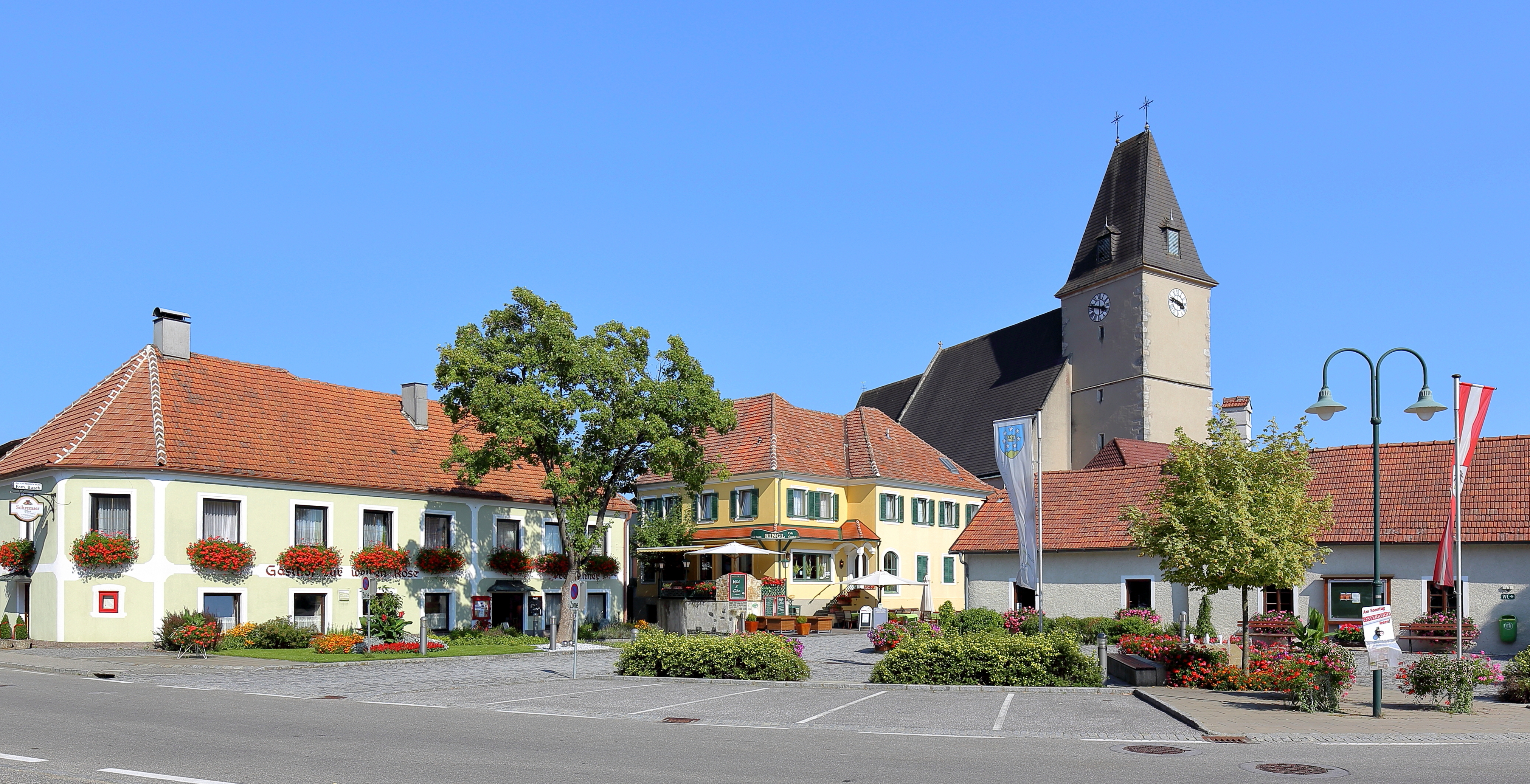 Westansicht des Ortszentrums von Maria Laach am Jauerling, eine niederösterreichische Marktgemeinde in der Wachau.